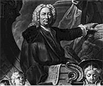 Johann Geor g Bergmüller, Freskomaler des Barocks. Selbstporträt